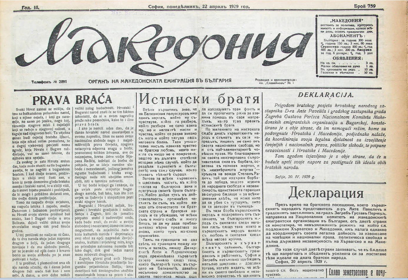 Вестник Македония със Софийската декларация.